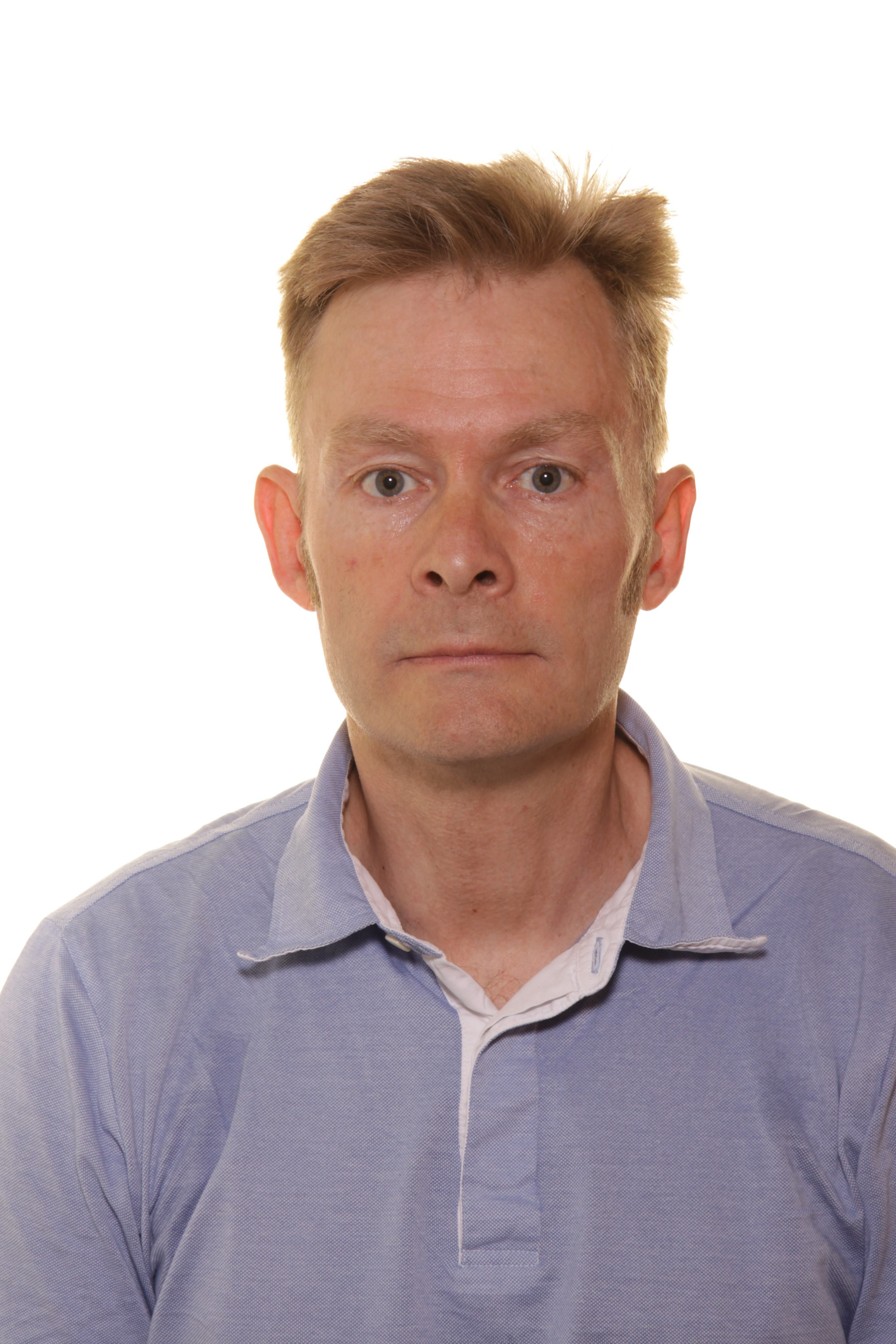 Preben Haarup, Islands Brygge, juni 2019